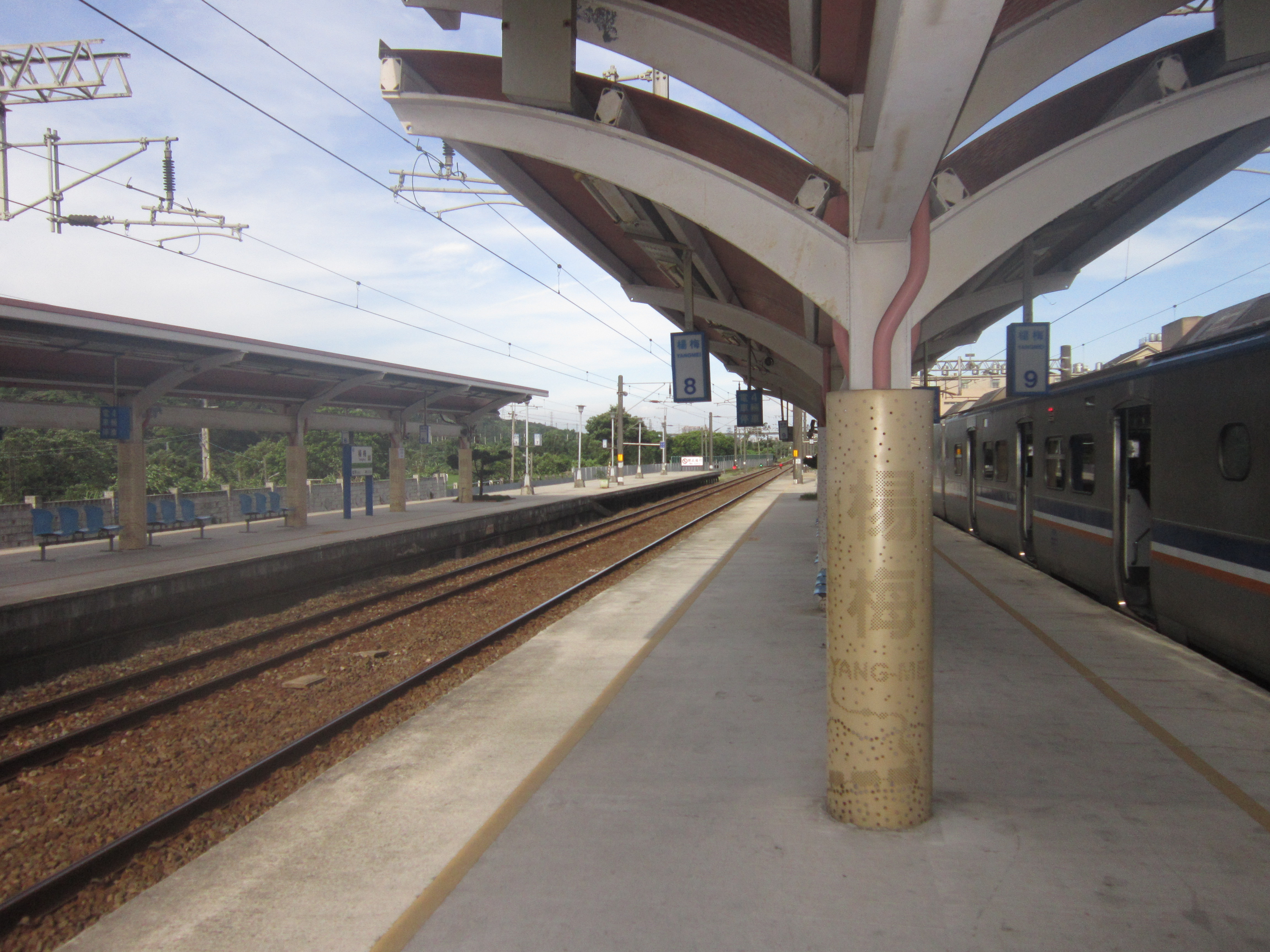 楊梅車站為兩座島式月台，月台的的支柱上有楊梅中英文的裝飾標註。